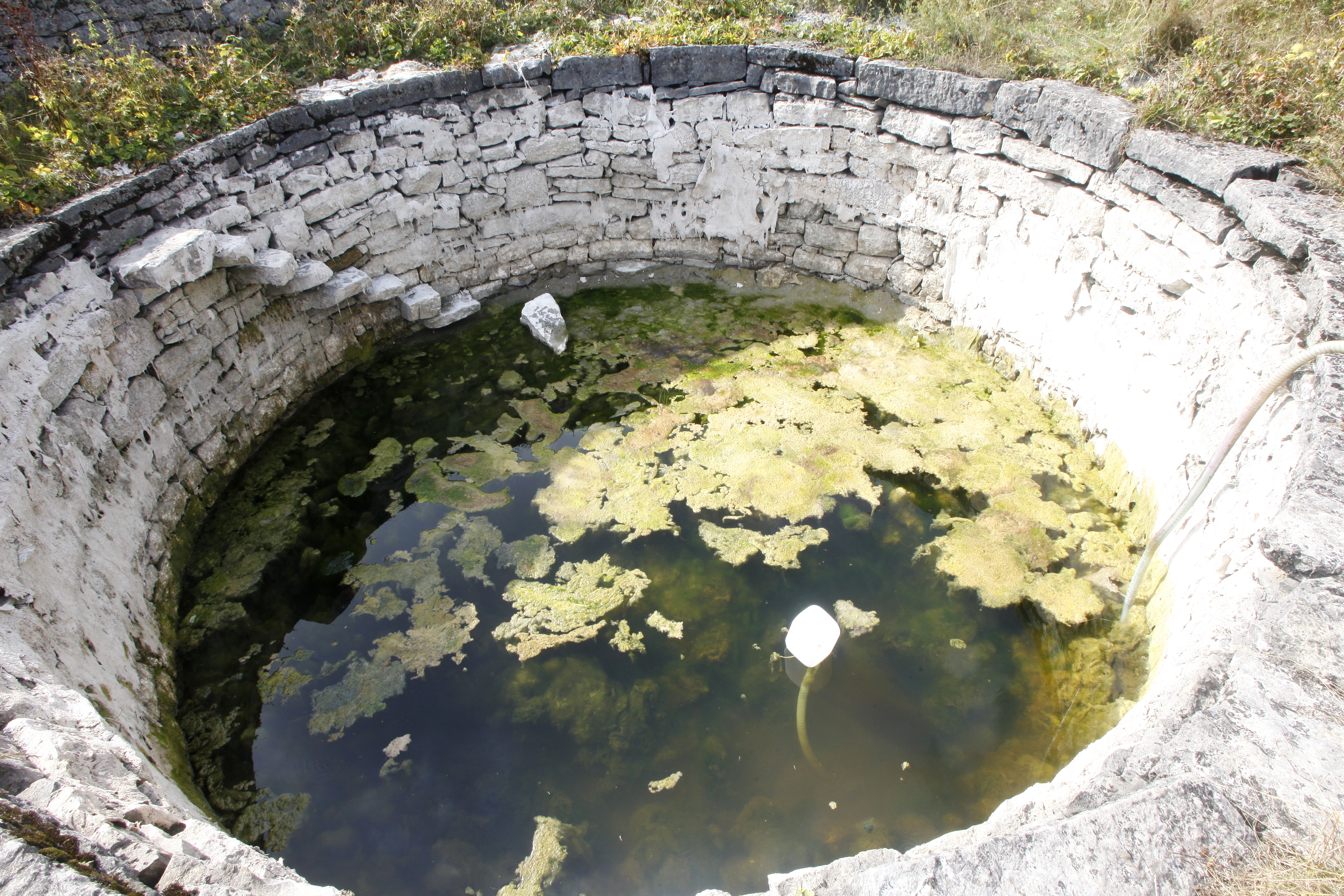 Une citerne dans un pâturage au nord du Vermelley.